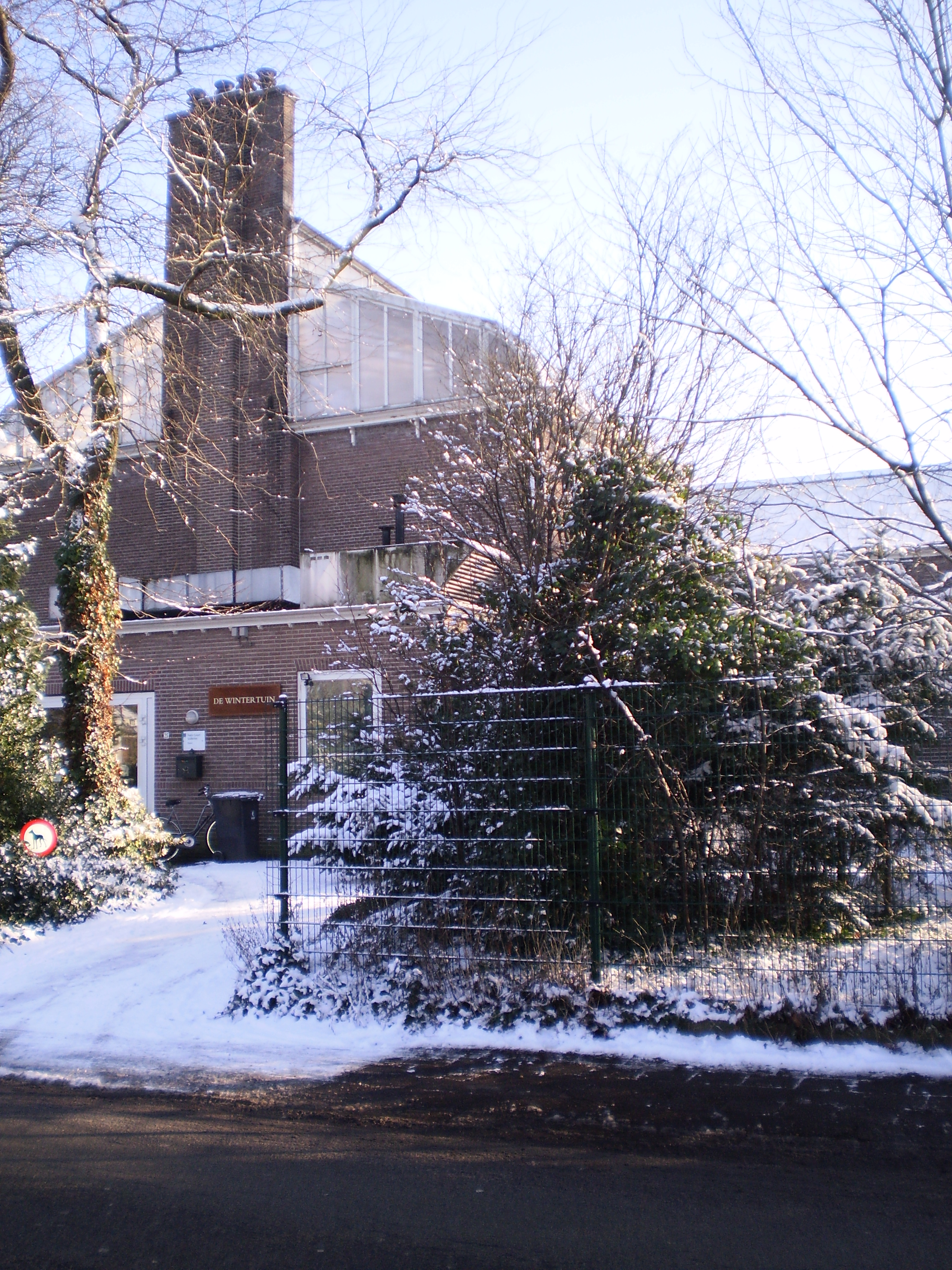 == Lisinsje: ==